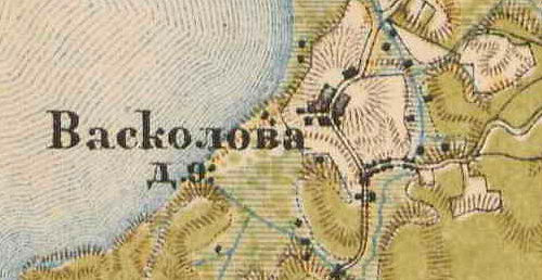 План деревни Васкелово. 1885 г.